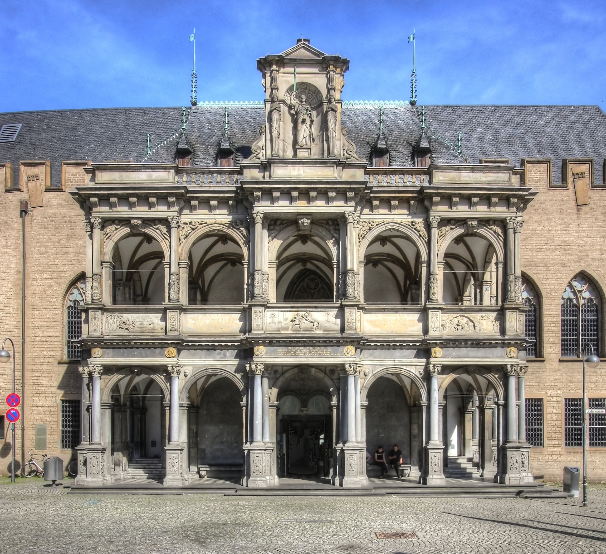 Renaissance-Laube des Kölner Rathauses This is a photograph of an architectural monument.